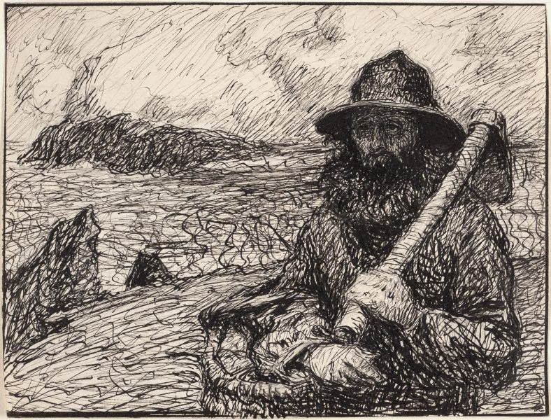 Mon ami 'Polite, drawing by John Peter Russell